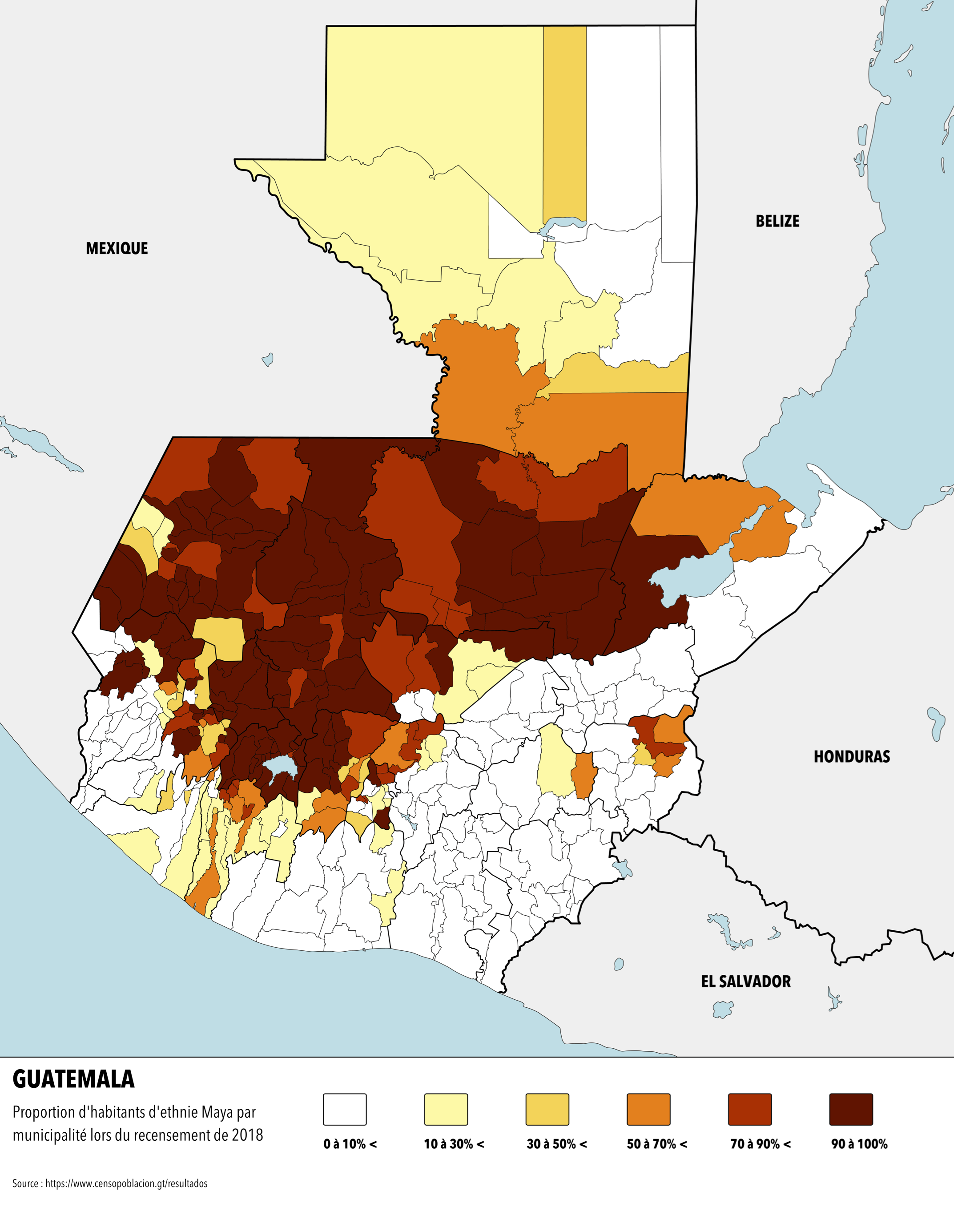 Carte ethnie Maya